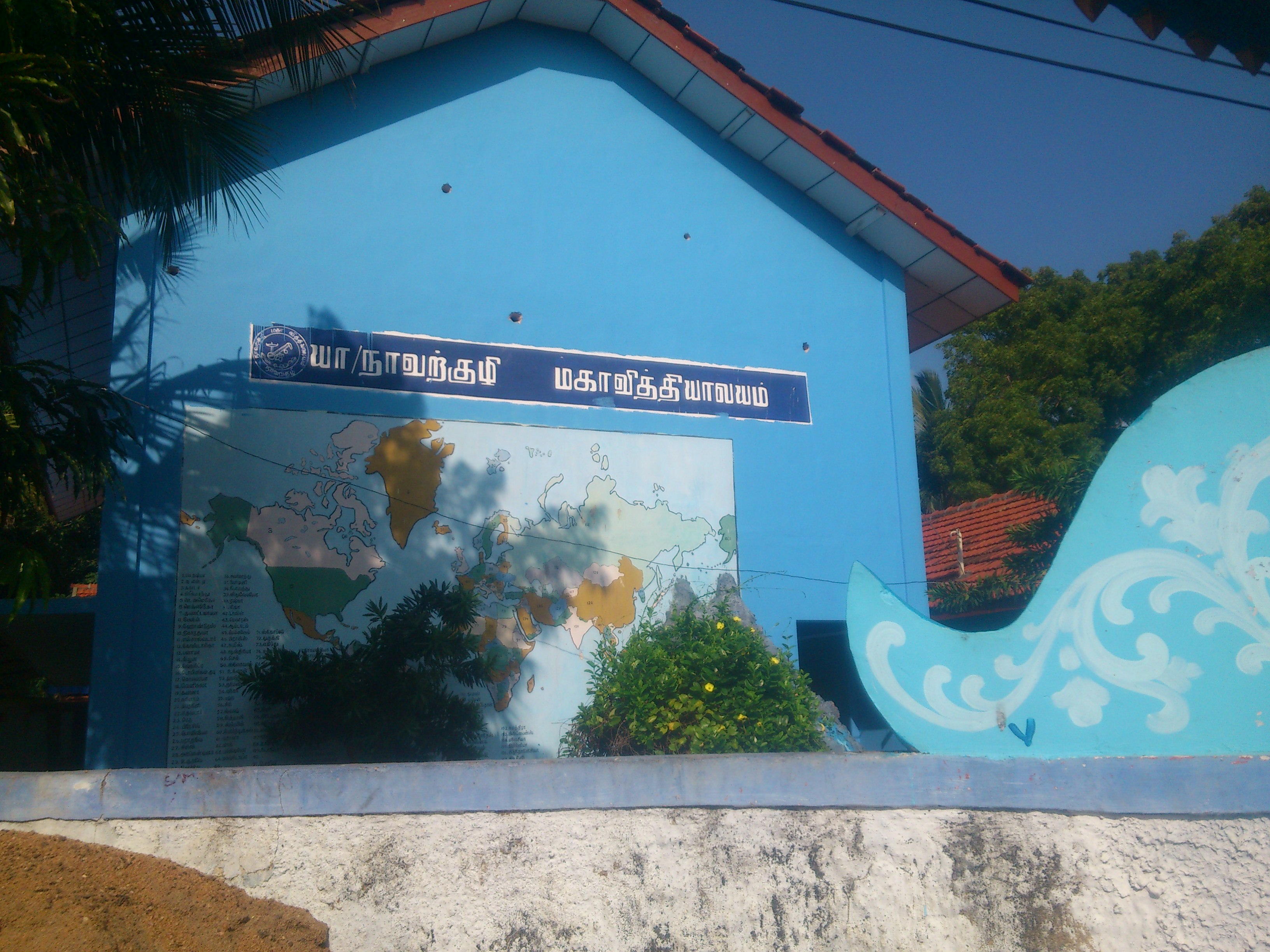 Navatkuli Maha vithyalayam